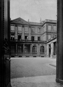 L'hôtel de Preaulx (ancien hôtel de Coigny) au n°89 rue du Faubourg-Saint-Honoré photographié en 1901 par Eugène Atget